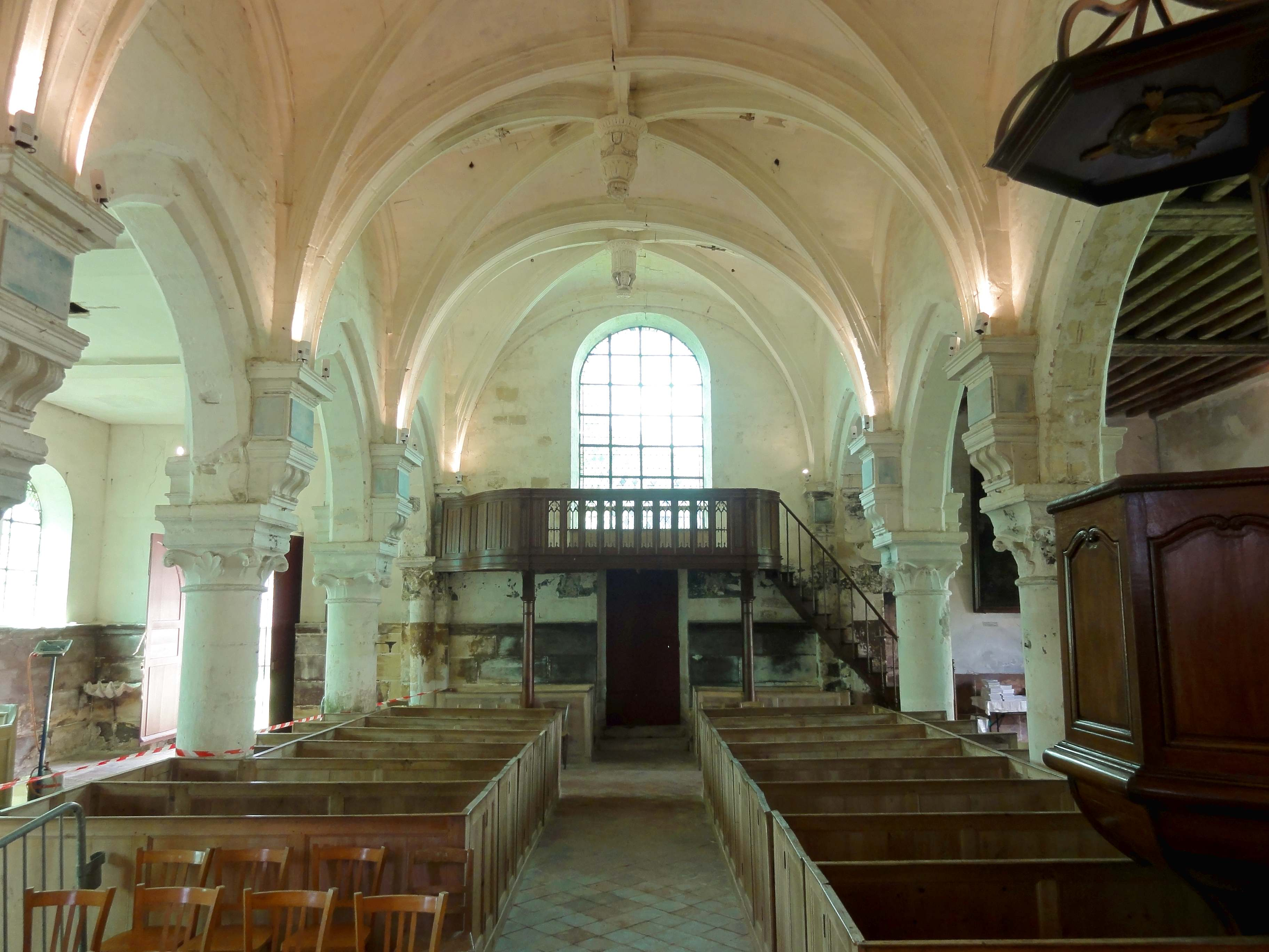 Intérieur de l'église (voir titre).